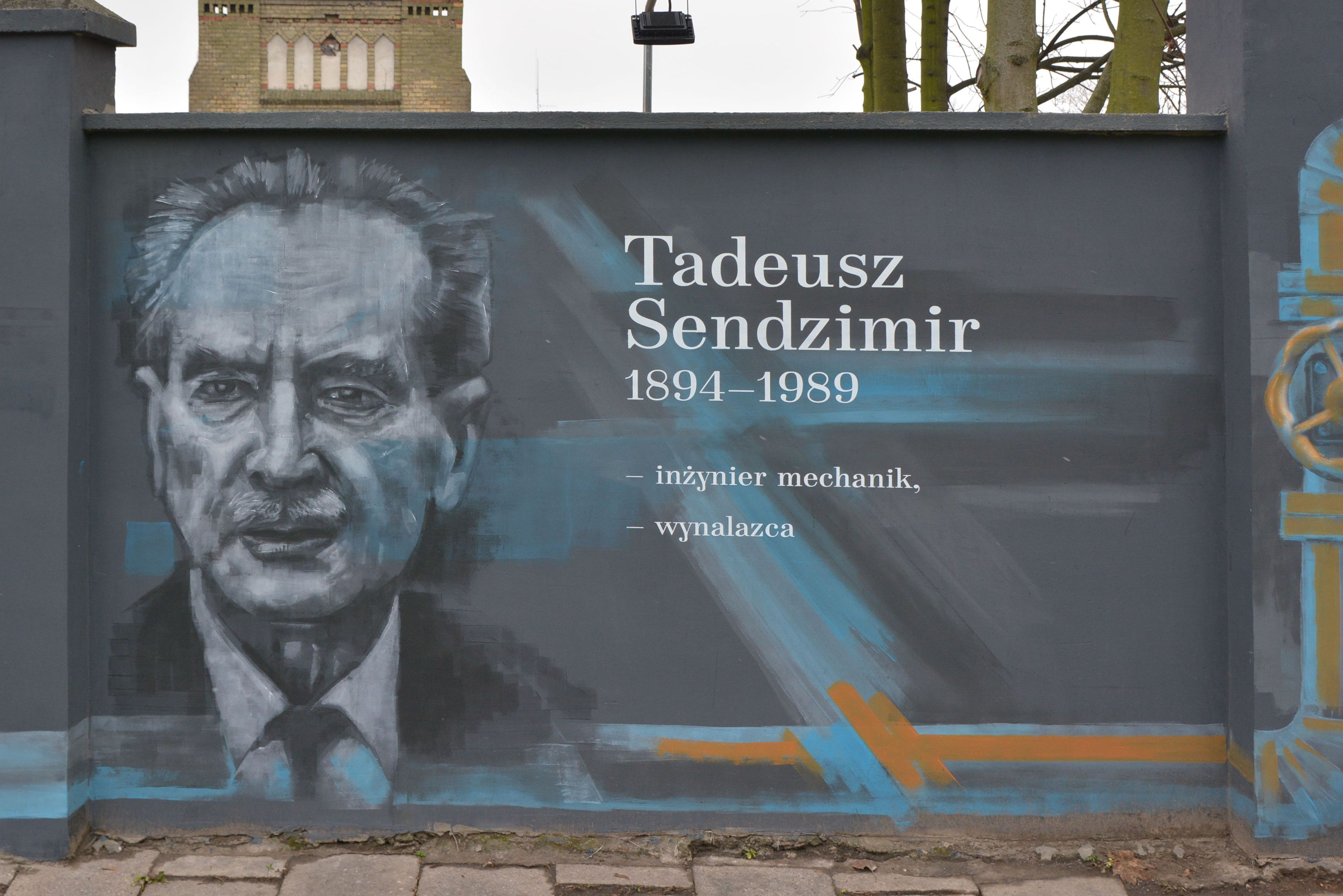 Tadeusz Sendzimir - fragment muralu przy ul. Chmielewskiego w Szczecinie